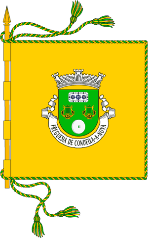 Bandeira da Freguesia de Condeixa-a-Nova